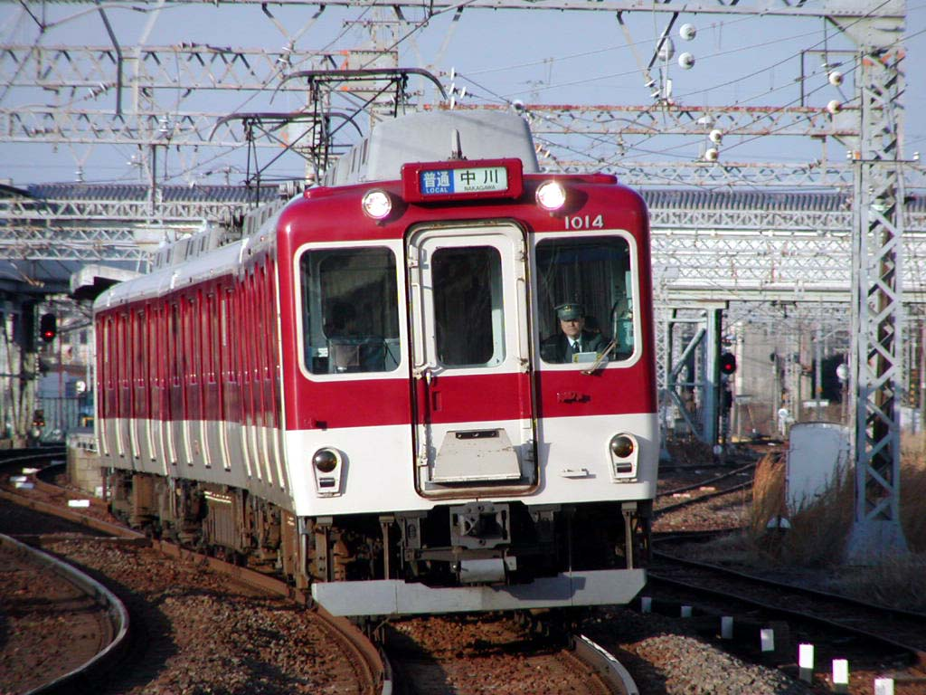 近鉄 1010系